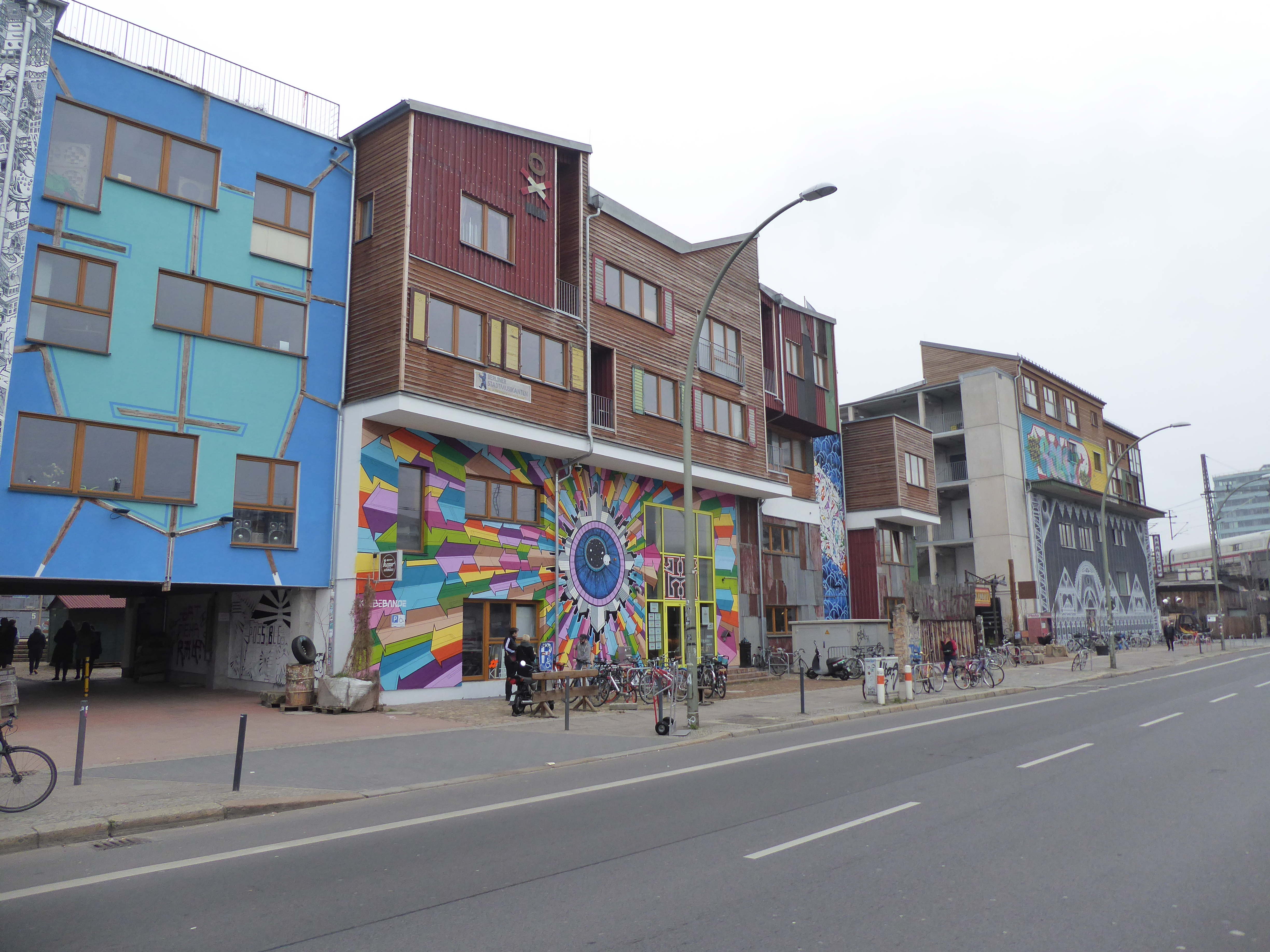 Projekt Holzmarkt in Berlin-Friedrichshain